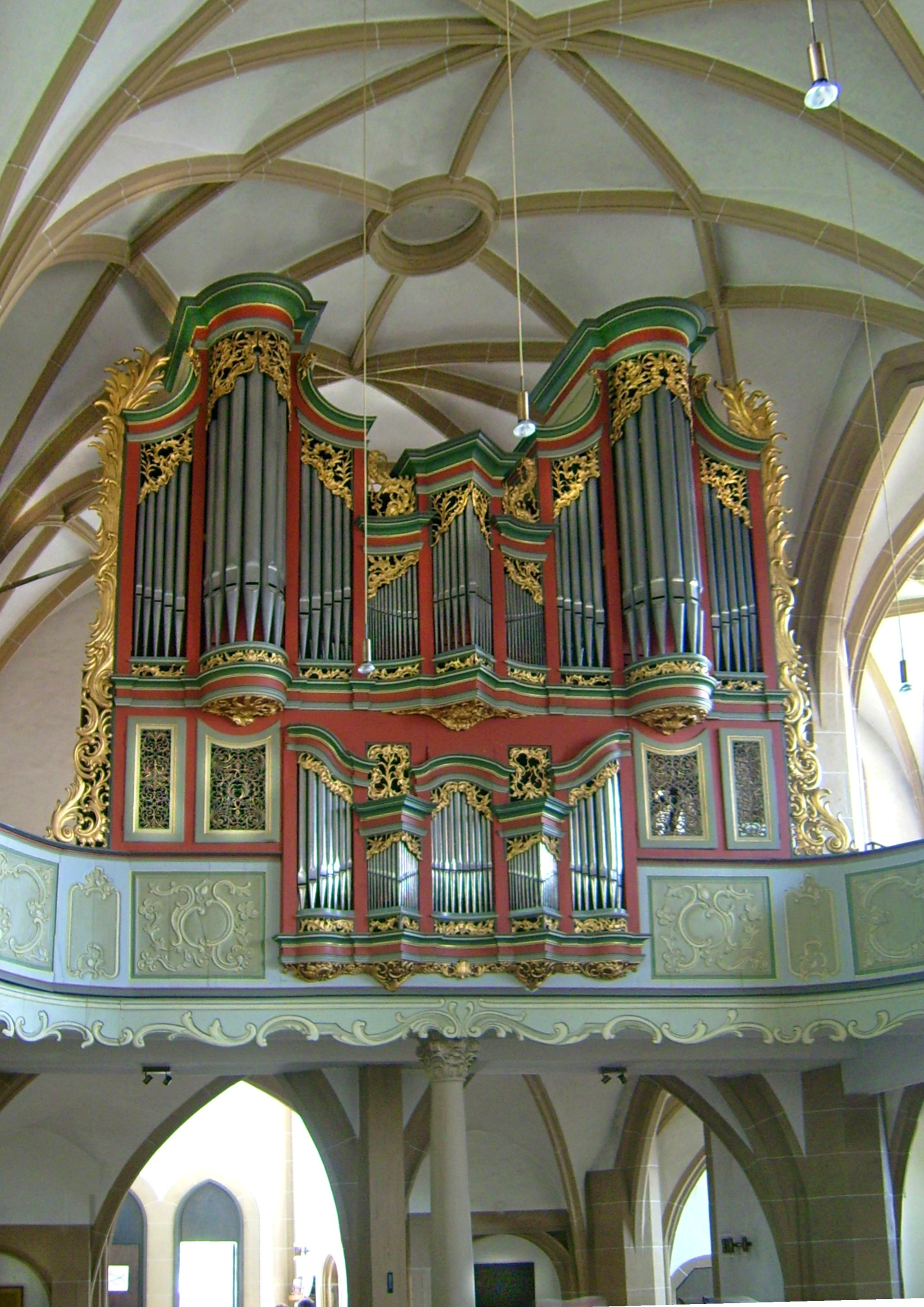 Orgel der Schlosskirche in Meisenheim